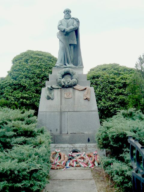 Batthyány-monument, Ikervár, Hungary